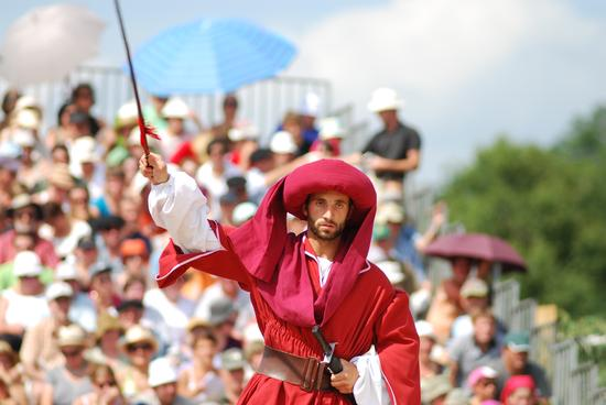 Xiberoko Jauna Pastoralaren lehen emanaldia - 2008-VII-27 - Ezpeize